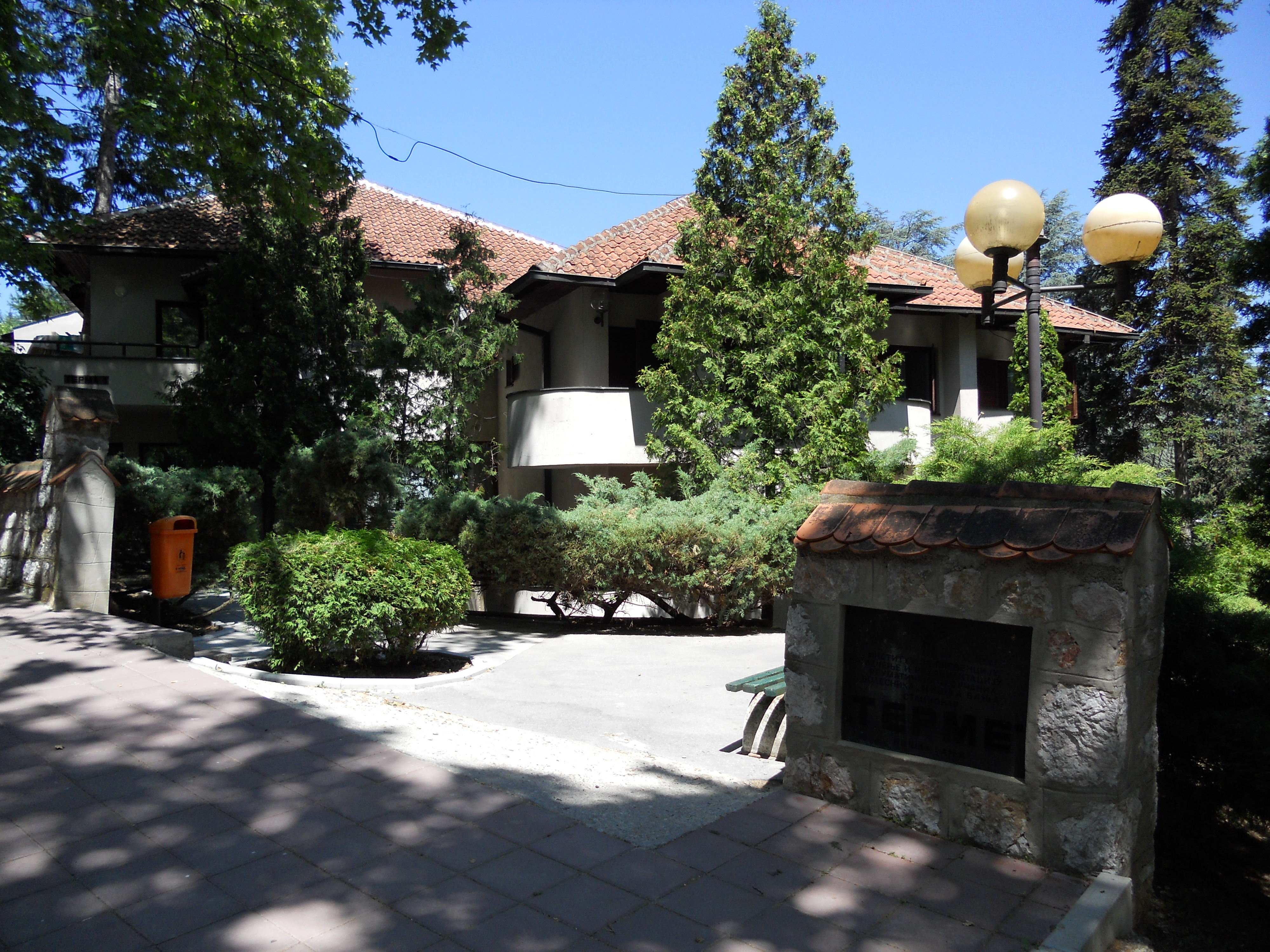 Hotel „Terme“ u Niškoj Banji. Autor: dr Milorad Dimić, Niš, Srbija. 17. jun 2012.